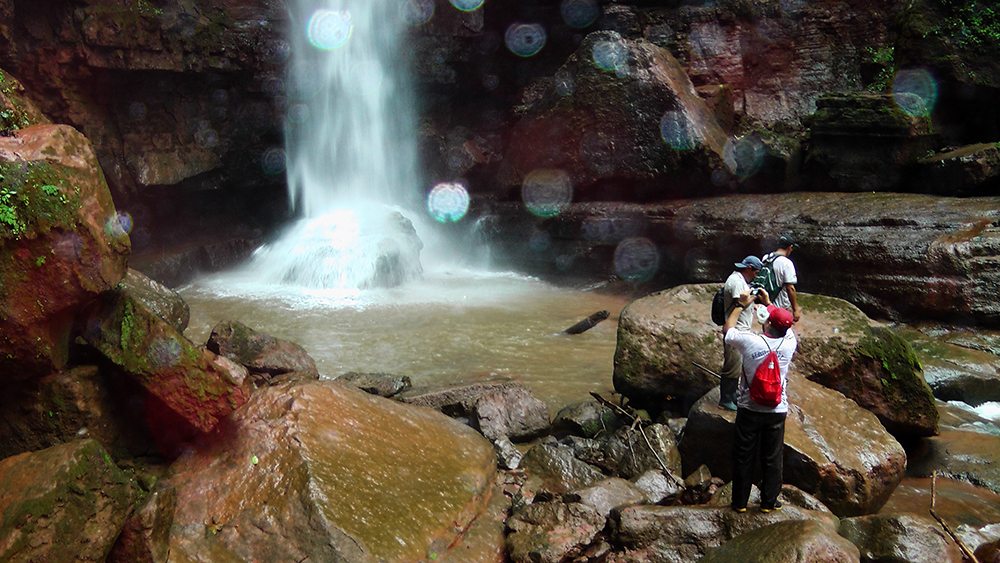 Catarata EL PAREDÓN